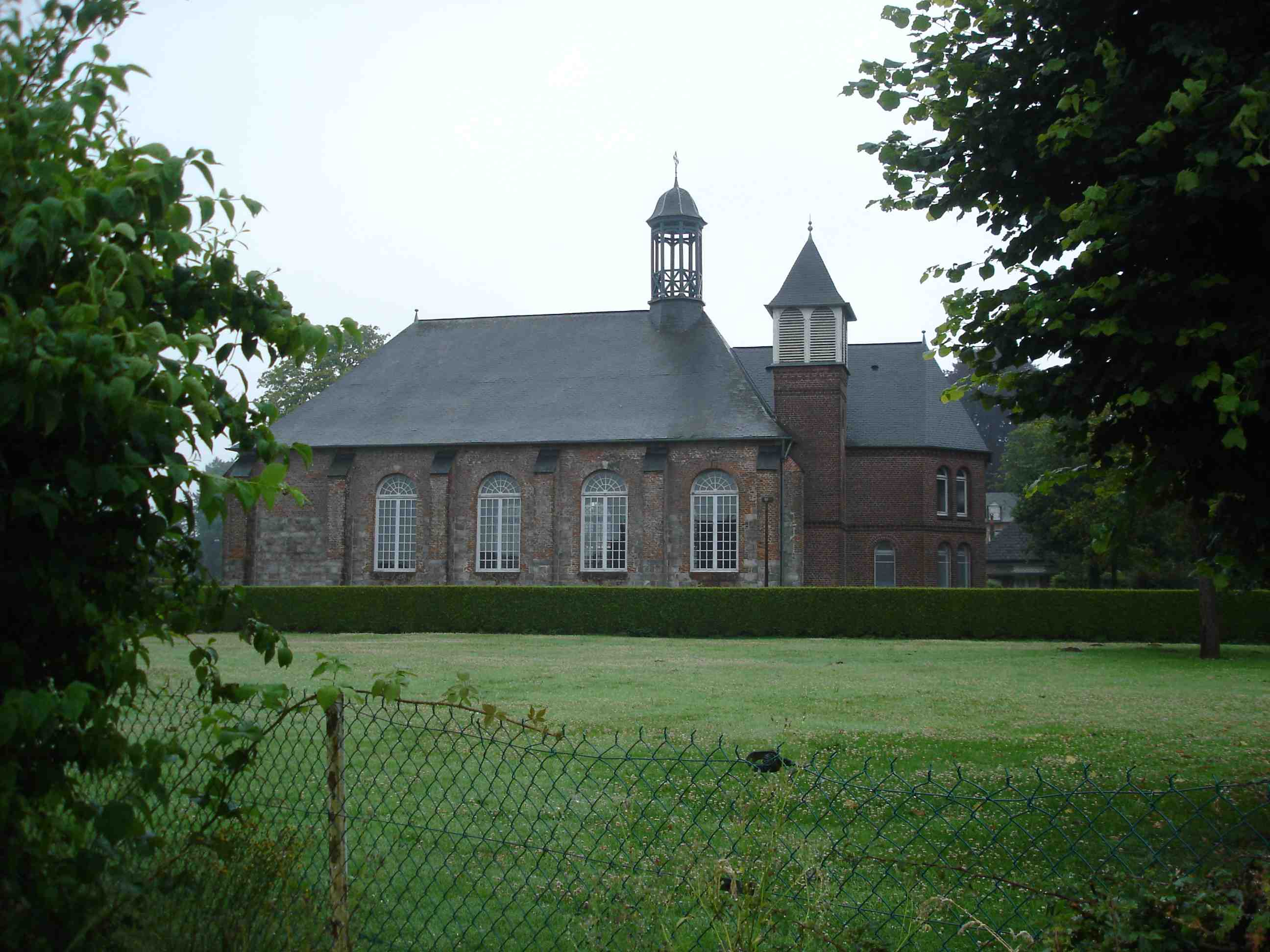 Temple Réformé où la première école du dimanche de France à été ouverte le 7 aôut 1814 par le pasteur Laurent Cadoret